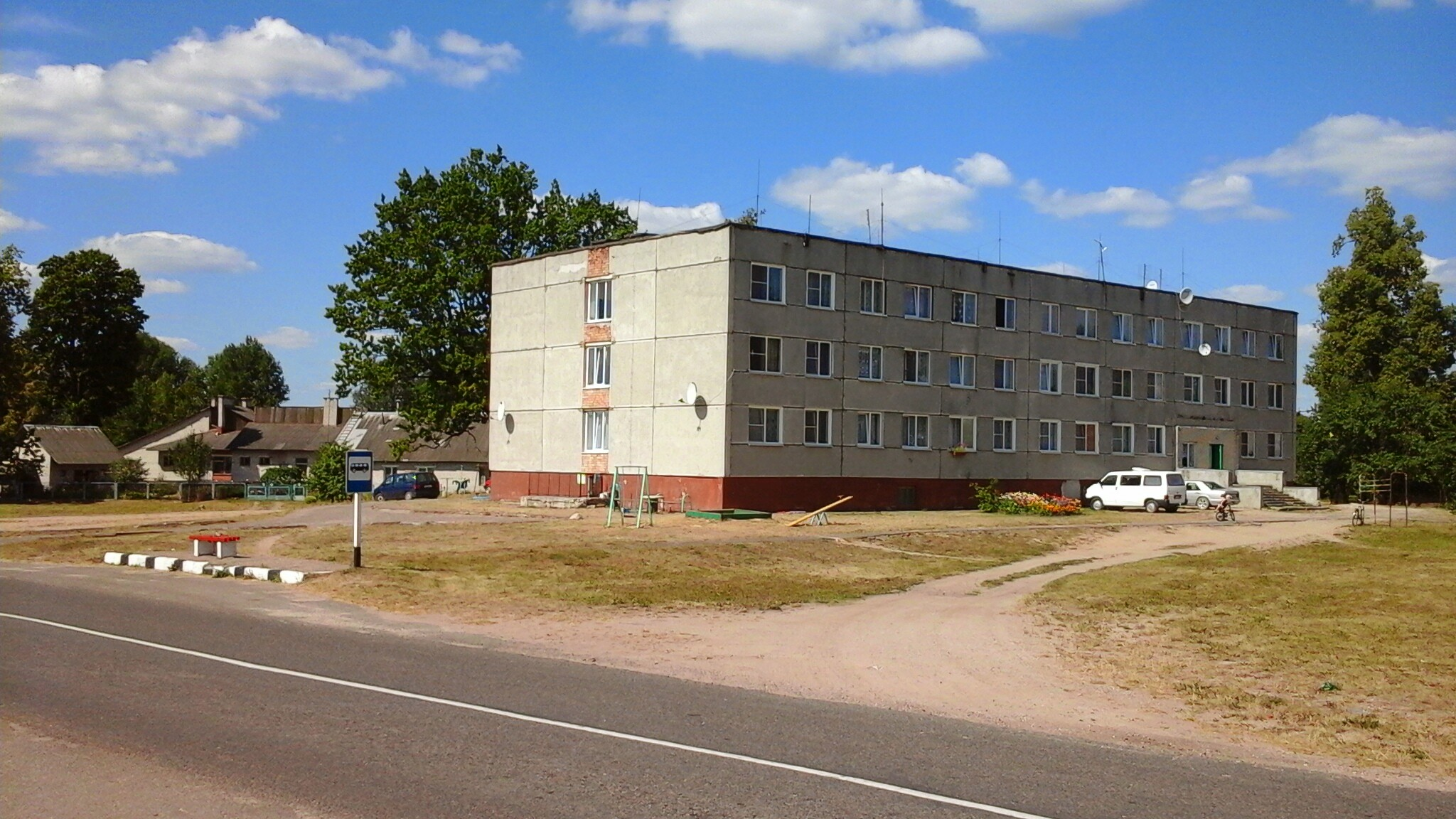 Общежитие в Мировщине